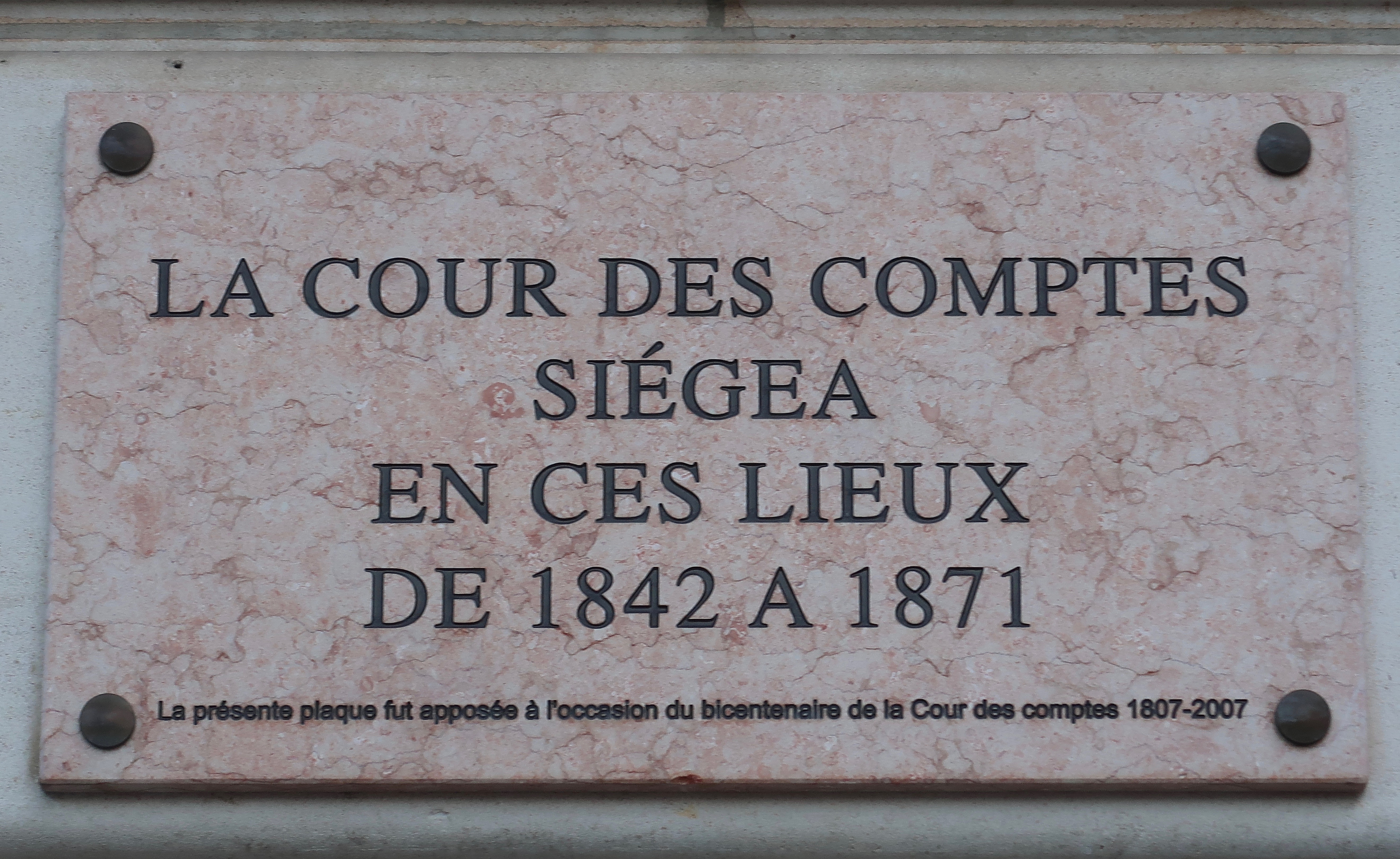 Plaque en hommage à l'ancien siège de la Cour des comptes, qui siégeait au palais d'Orsay de 1842 à 1871. La plaque est posée sur la façade du musée d'Orsay, côté ouest de la rue de Lille (Paris 7e).